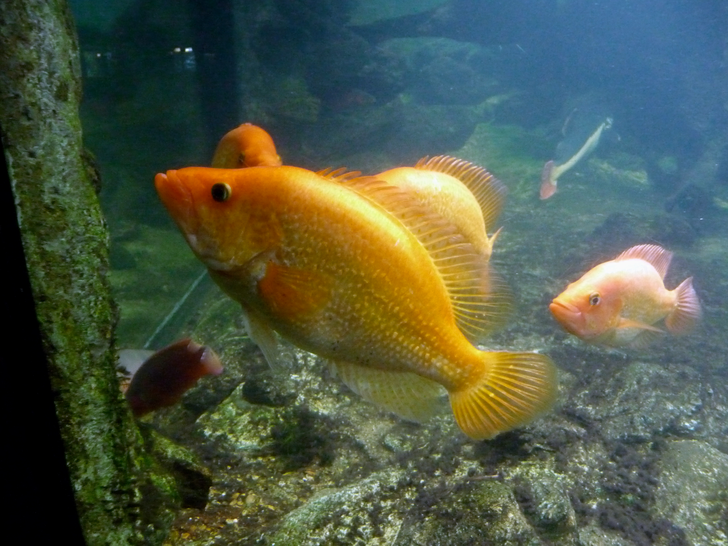 Petenia splendida in the Aquarium tropical du Palais de la Porte Dorée (Paris)